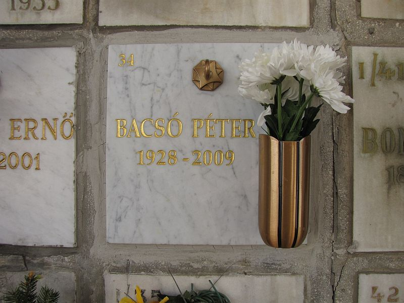 Bacsó Péter (Kassa, 1928. január 6. – Budapest, 2009. március 11.) Kossuth-díjas magyar filmrendező sírja Budapesten. Farkasréti temető: 607-34. templomi fülke